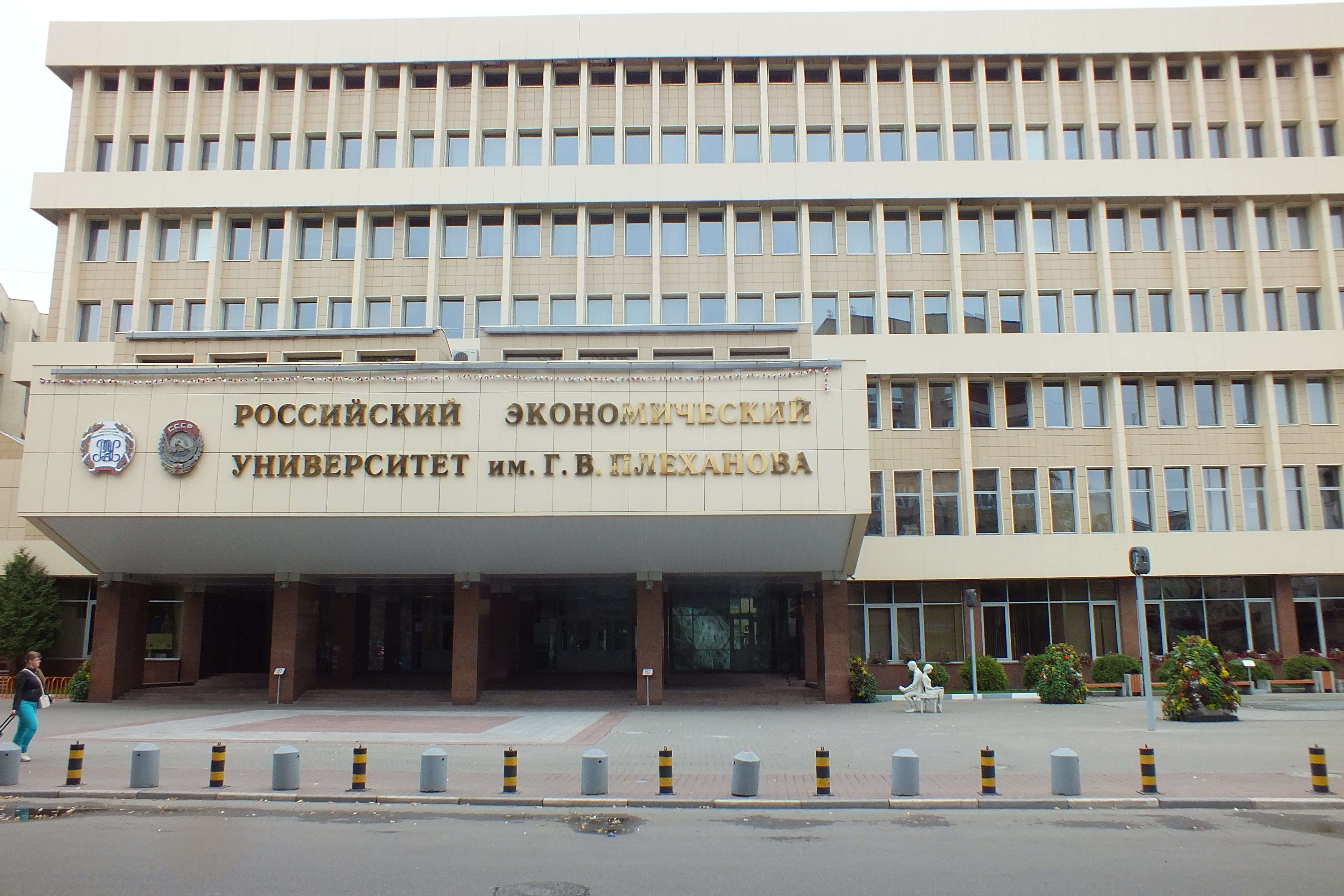 III учебный корпус РЭУ имени Г.В. Плеханова